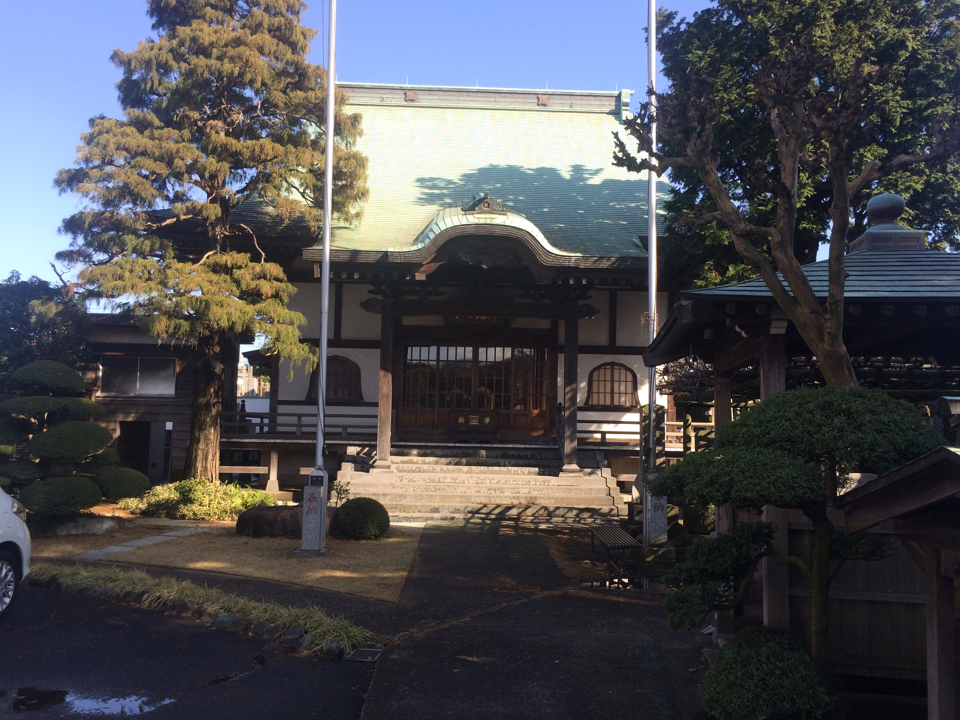 神奈川県横浜市神奈川区片倉五丁目長遠寺本堂